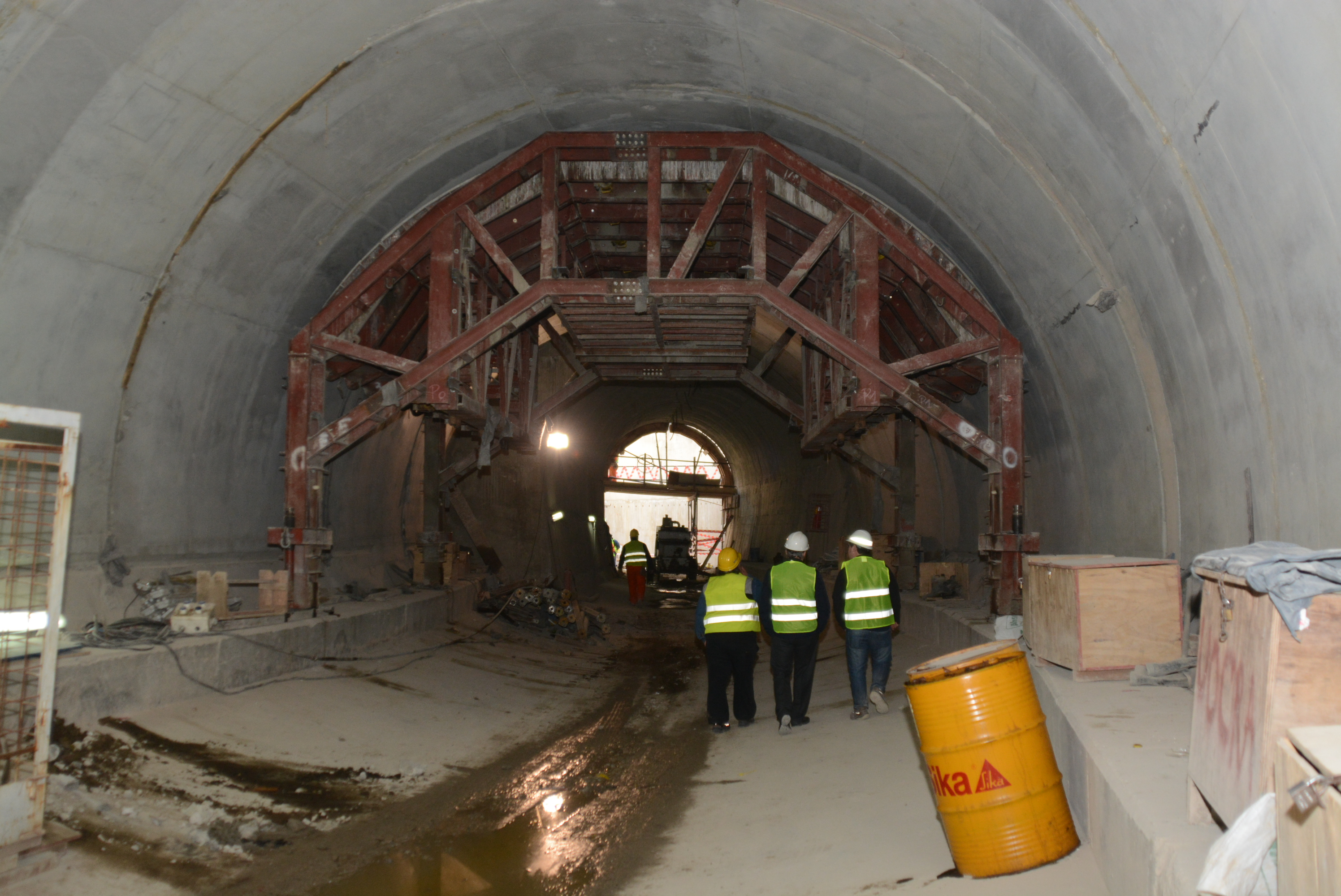 Cochera en construcción de la Línea H del Subte de Buenos Aires.